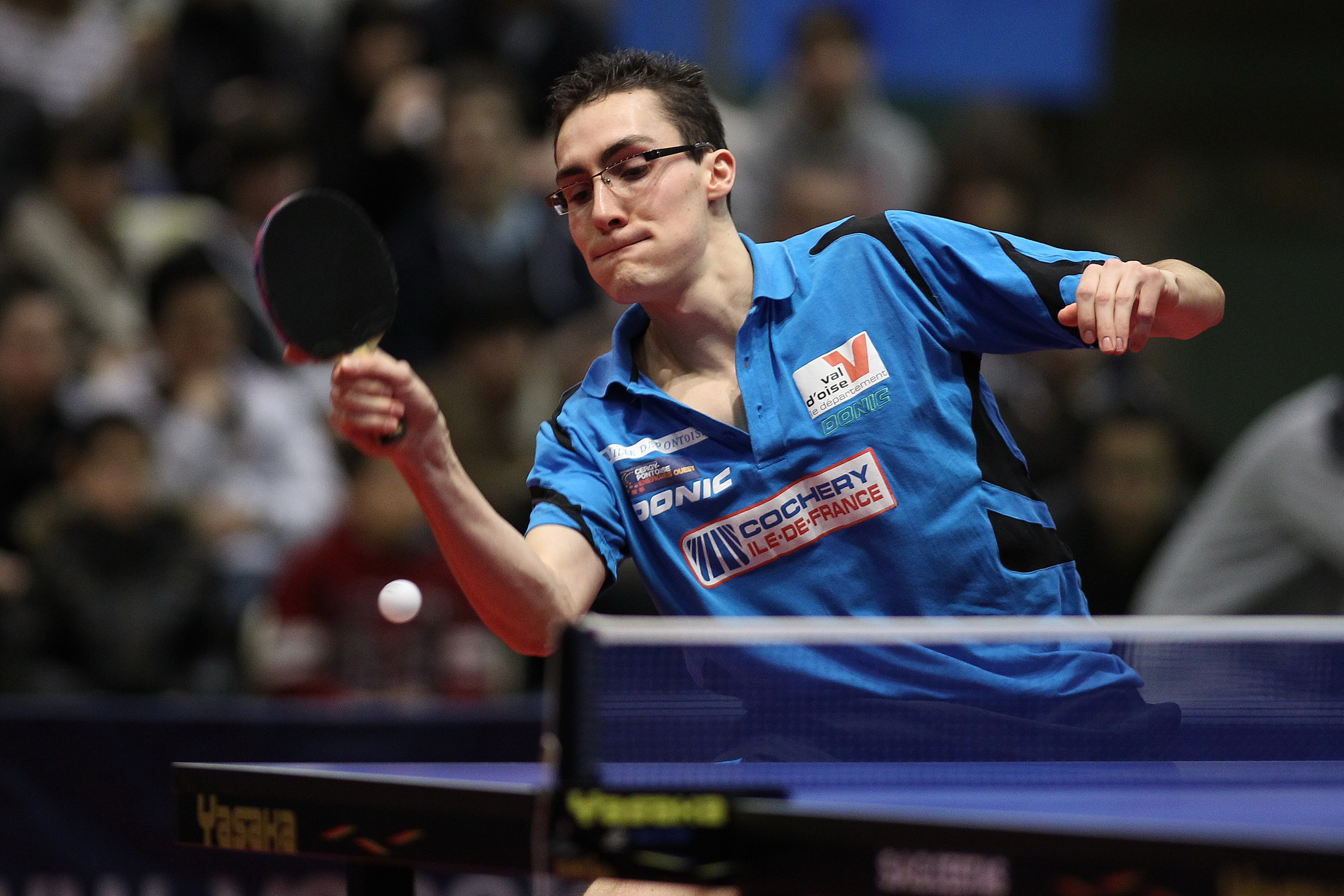 Adrien Mattenet. Joueur de Tennis de Table, actuel n°1 Français, n°30 Mondial.